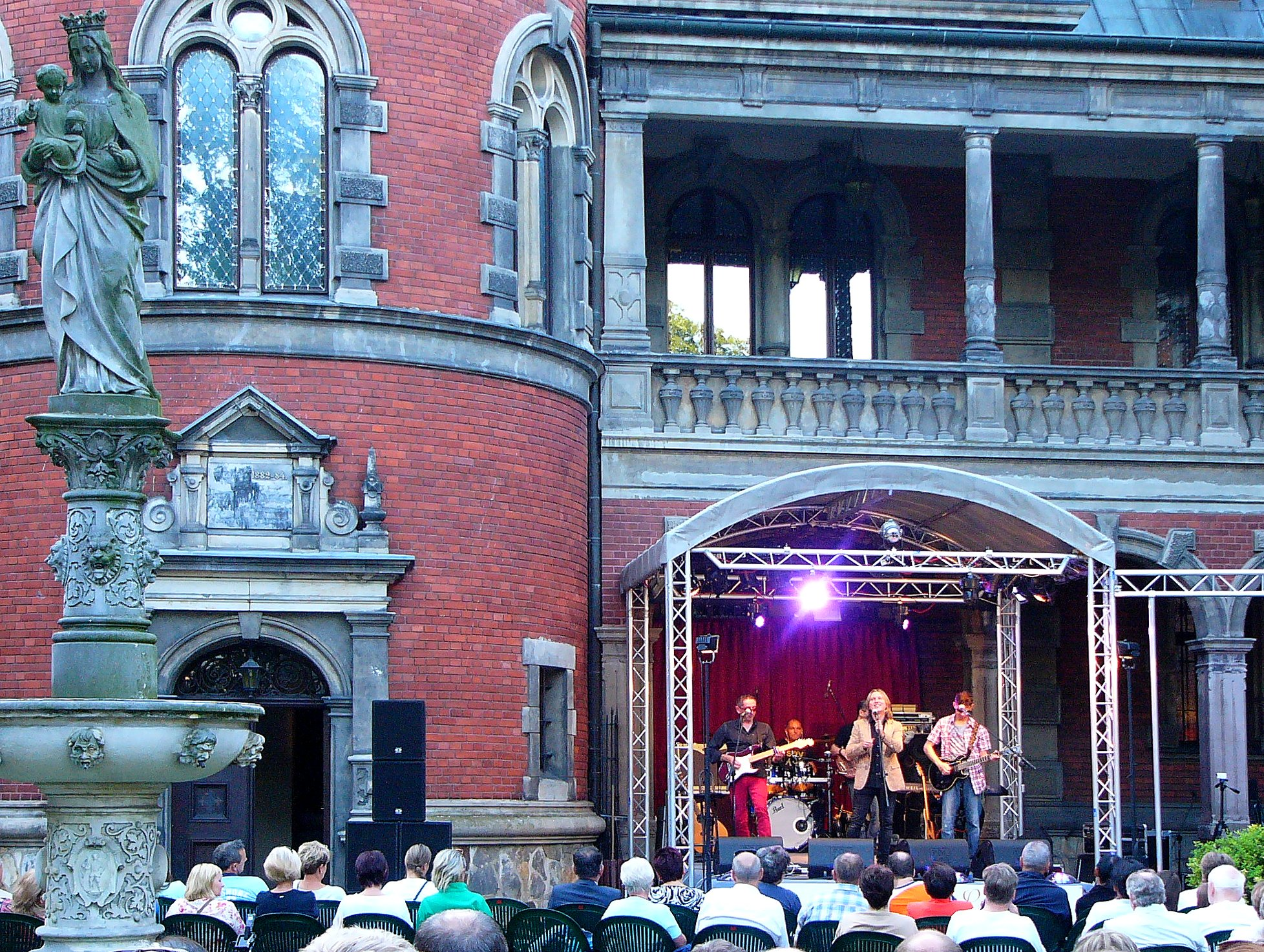 Universe - eine Band aus Königshütte bei einem Konzert in Flössingen.